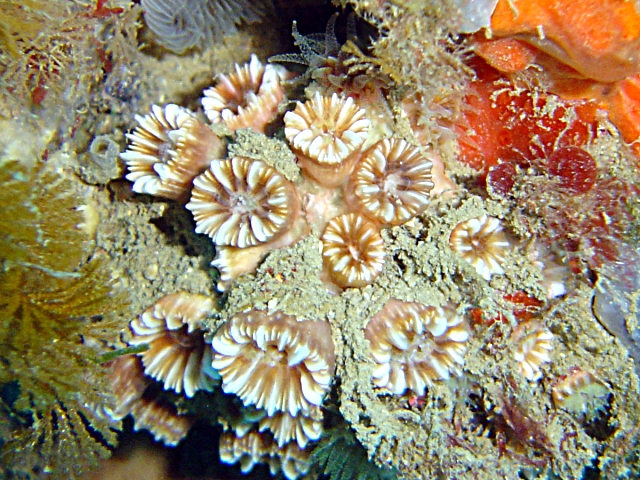 Polycyathus muellerae Este coral es propio del mar Mediterráneo, y se distribuye por todas las costas de la Península Ibérica, hasta el Golfo de Vizcaya. Forma colonias que se extienden horizontalmente por el sustrato, aunque a veces se observan formaciones arborescentes. Normalmente son de color marrón, con los tentáculos marrones o verdes brillantes. A veces se alternan en la corona de tentáculos el marrón y el blanco. Suele aparecer en grietas, fisuras, oquedades, paredes contraplomadas y pequeñas cuevas, entre los 5 y los 20 metros de profundidad. Suelen hospedar a una gran variedad de pequeños animalillos y algas.